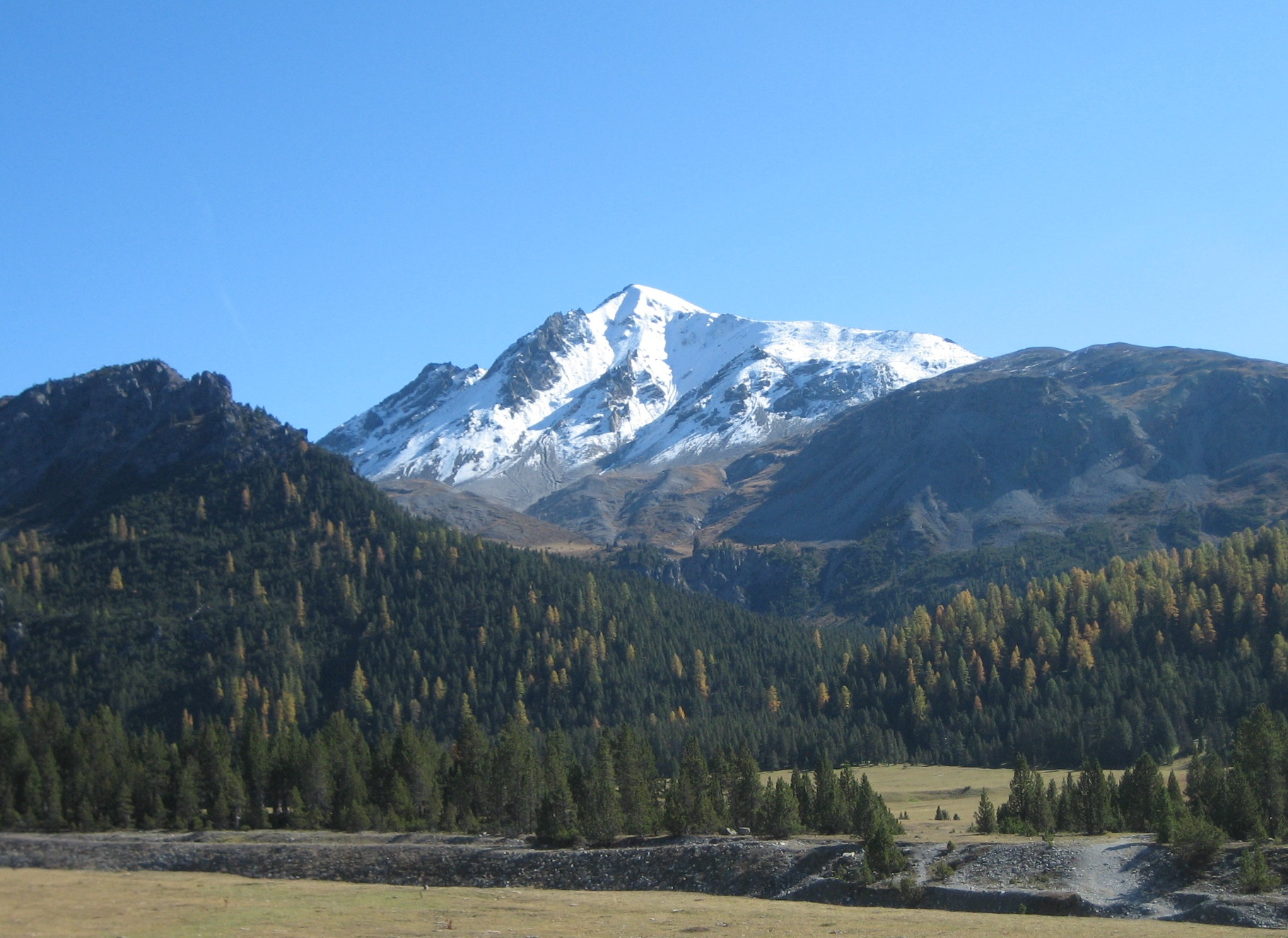 Piz Daint von NW von der Ofenpassstrasse aus